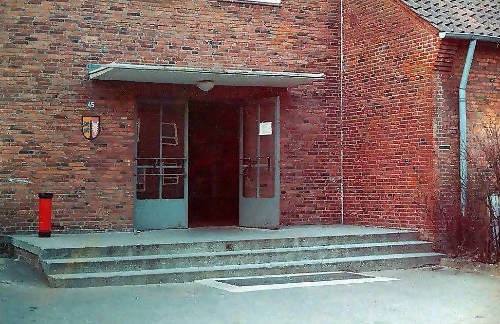 Haupteingang, Kasernenblock 45 der Briesen-Kaserne Weiche (um 1976)